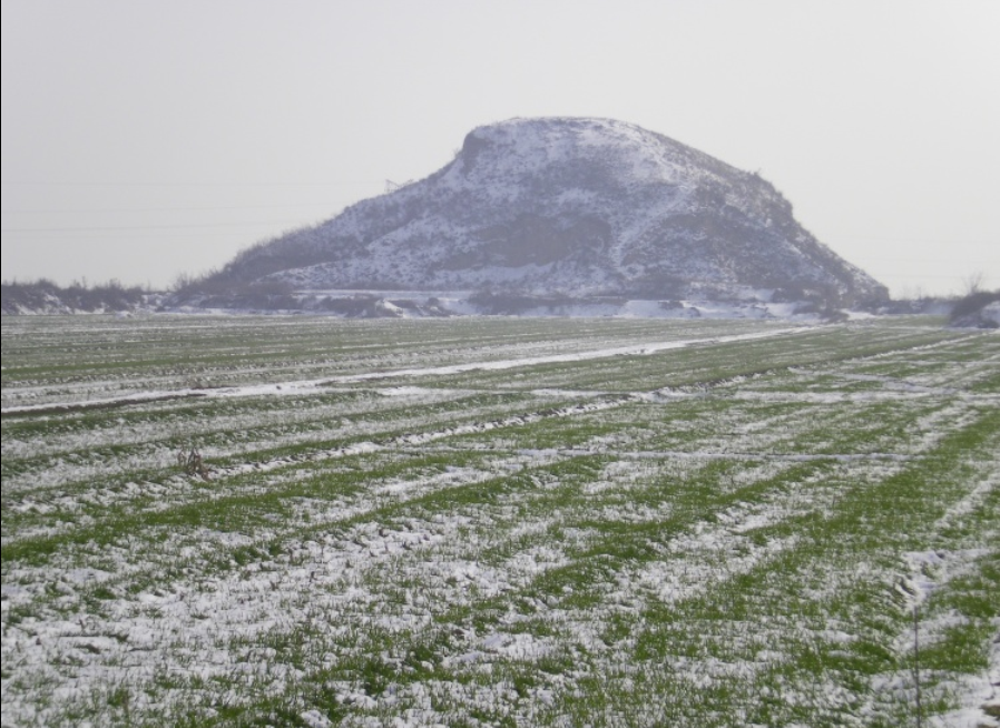 位于汉哀帝义陵东侧